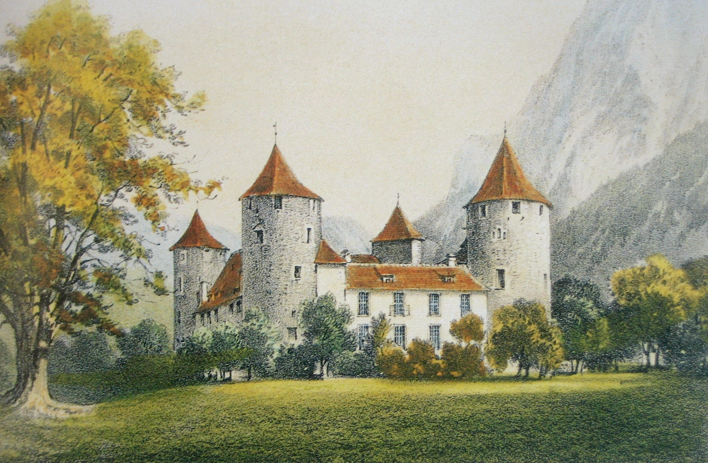 Schloss Marschlins 1870, Litho von Carl Heinrich Gernler (1811 - 1880)